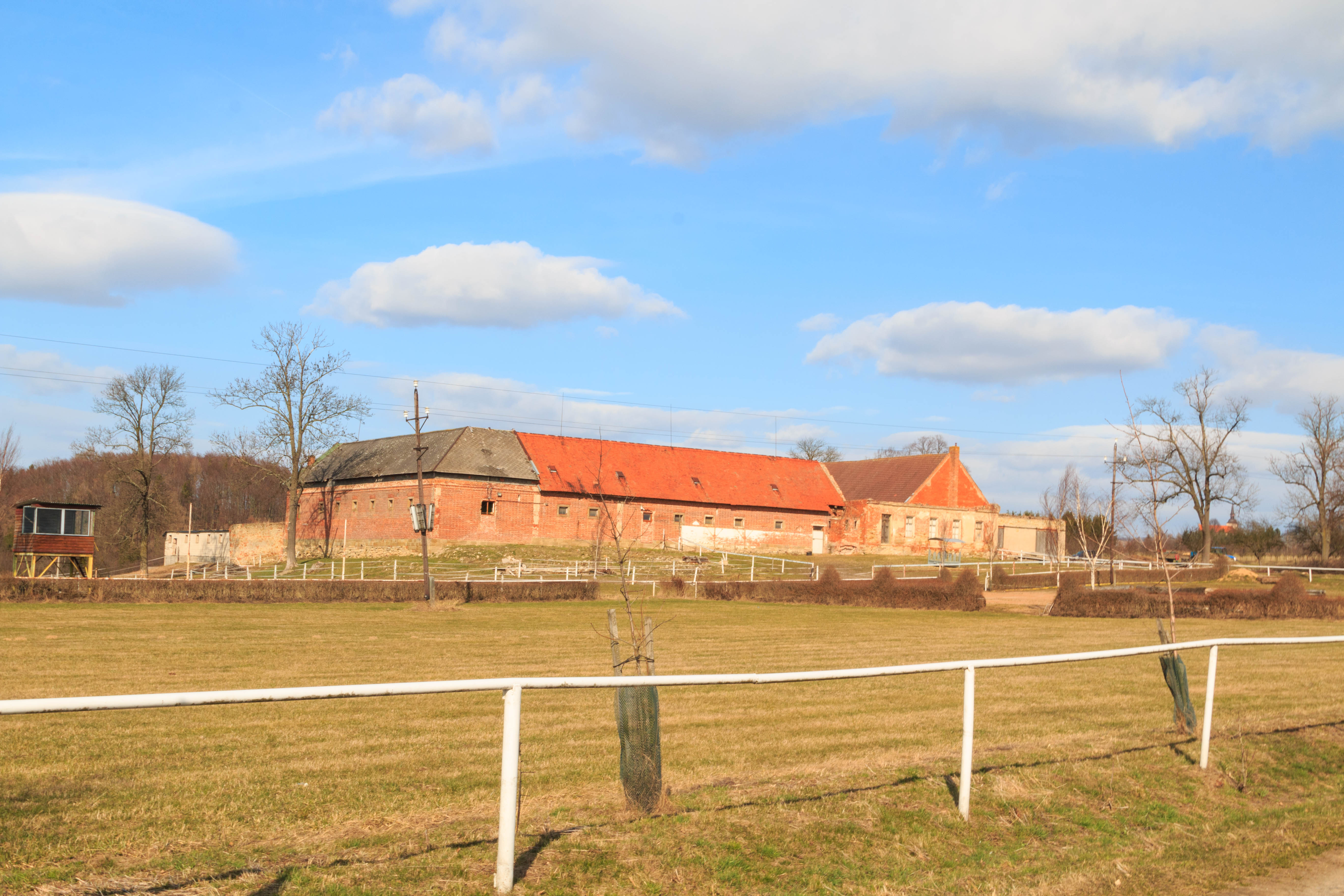 Dvůr Závrší